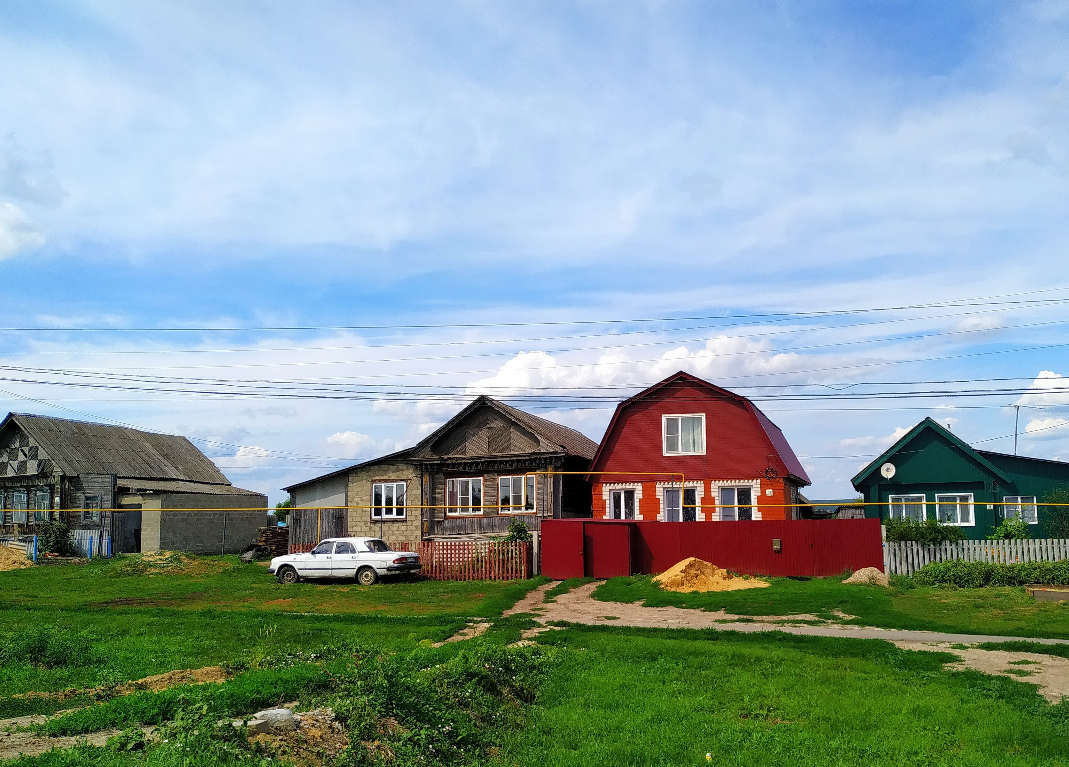 Тургенево, Мордовия, Россия